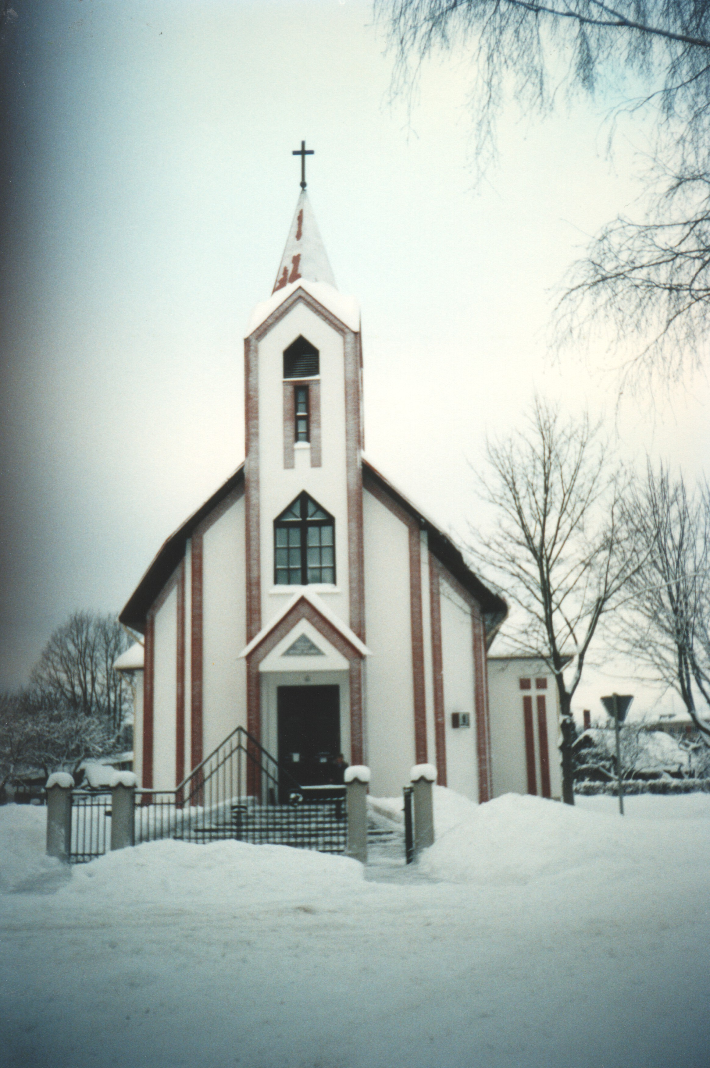 Siguldas Romas katoļu baznīca